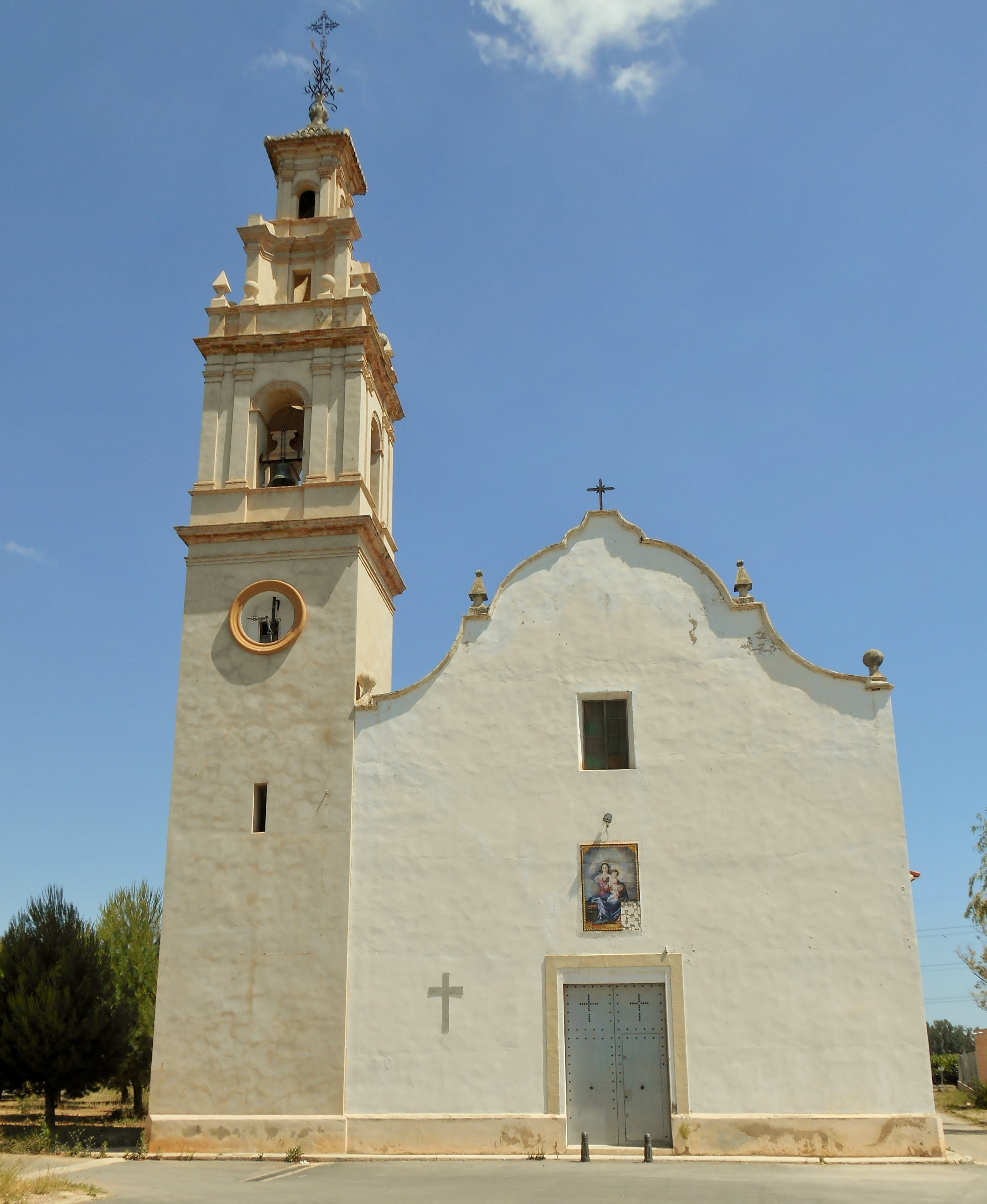 Benexida antiga.